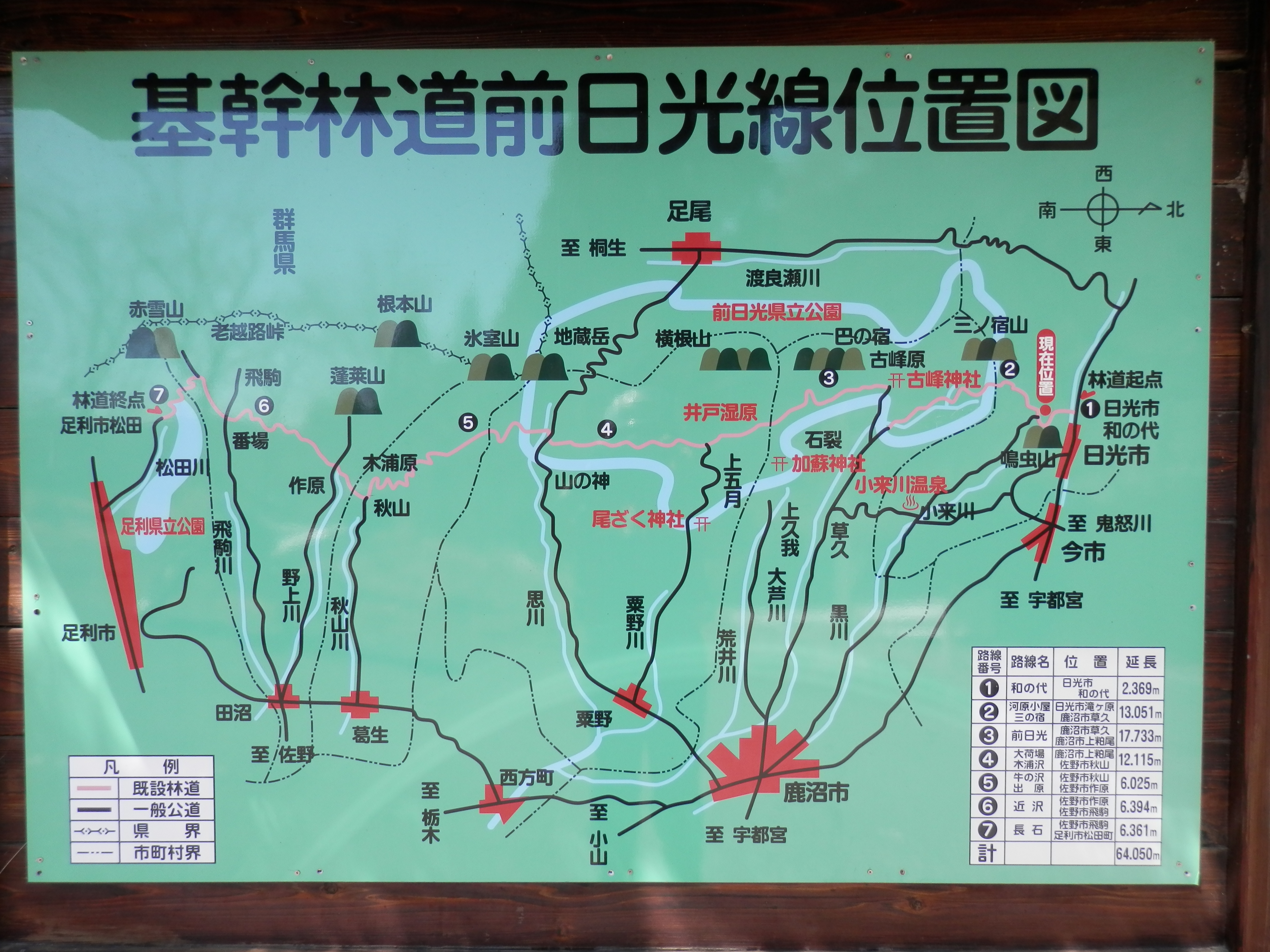 林道河原小屋三の宿線起点付近にて撮影